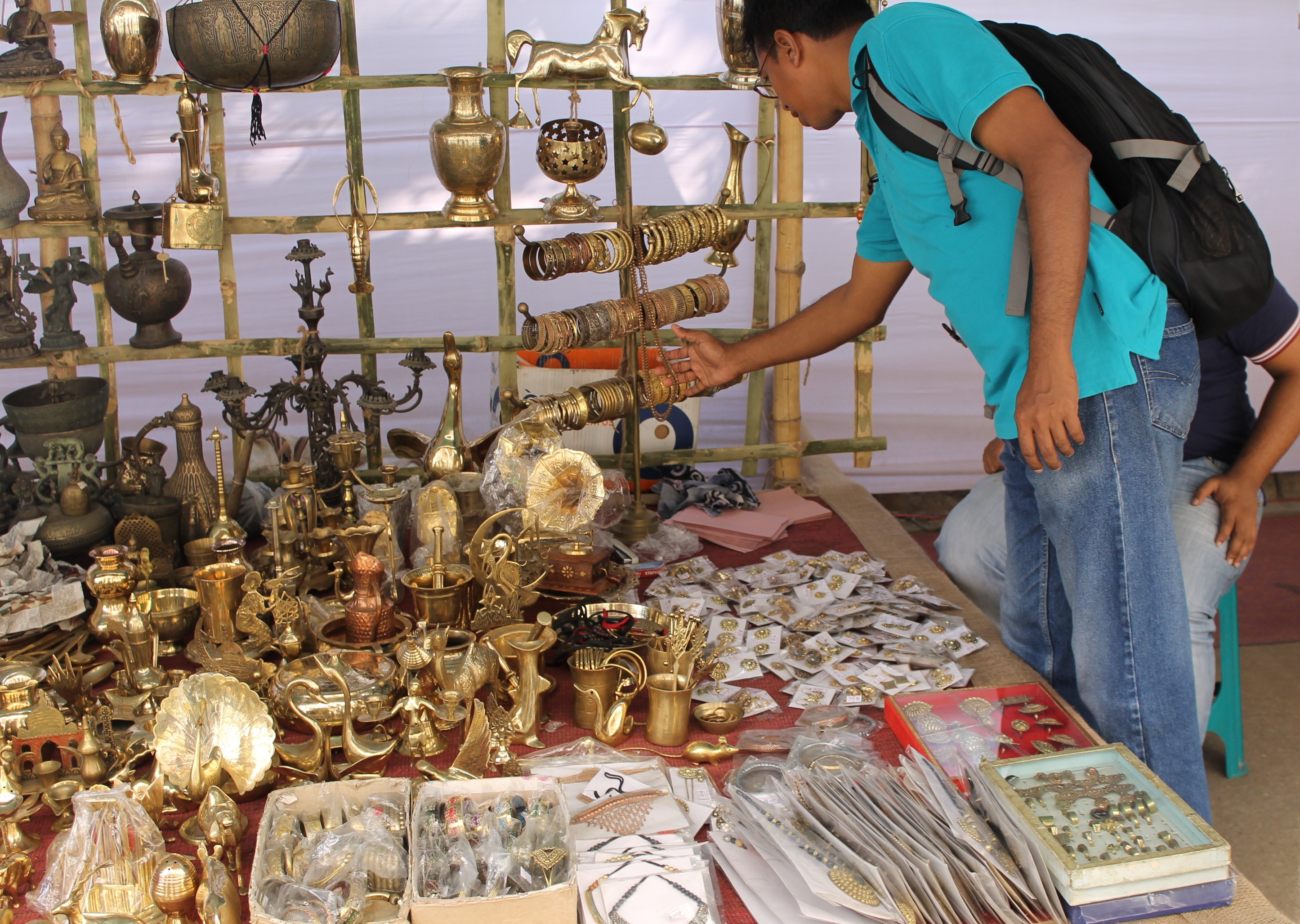 কাঁসার তৈজসপত্র ও নকশী পণ্যের দোকানে ক্রেতা